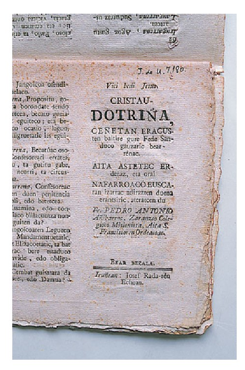 1802an Iruñean argitara emandako Pedro Antonio Añibarroren Cristau Doctriña Ceñetan Eracusten baitire gure Fede Sanduco gauzaric bearrenac obraren inprentako frogak (KOLDO MITXELENA Kulturunea).